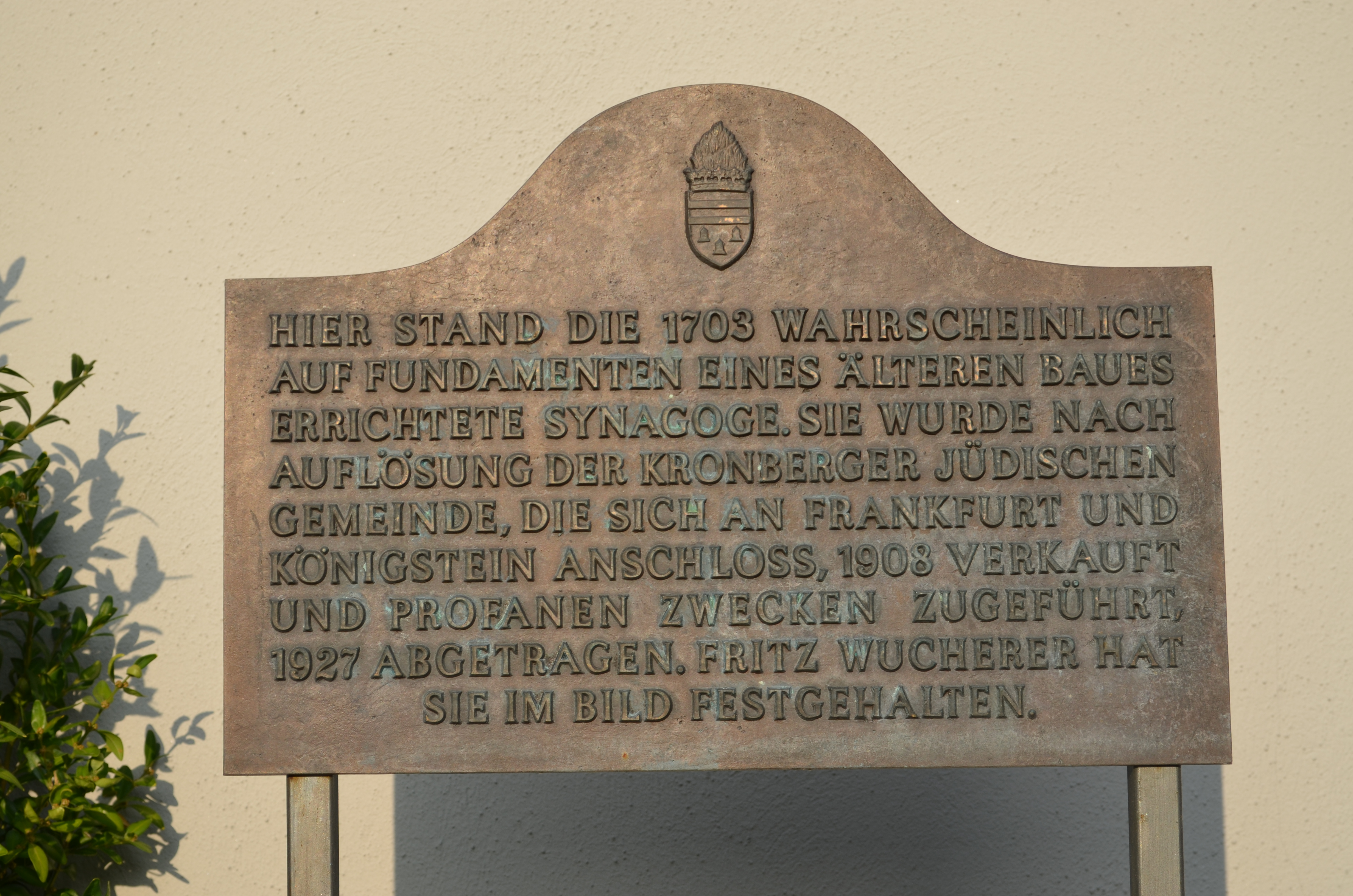 Kronberg, Mauerstraße, Schild Synagoge